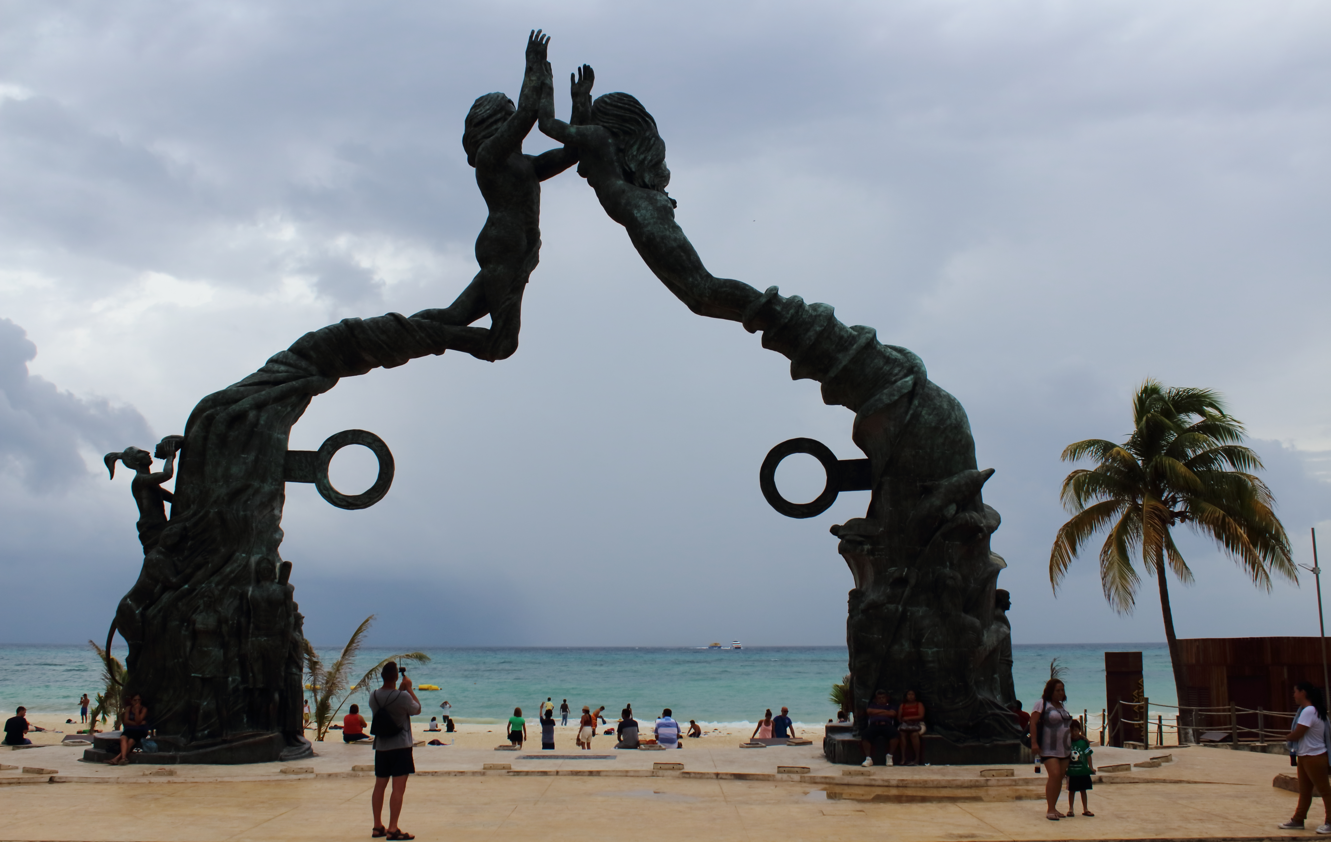 Entrada en Playa del Carmen, Quintana Roo.